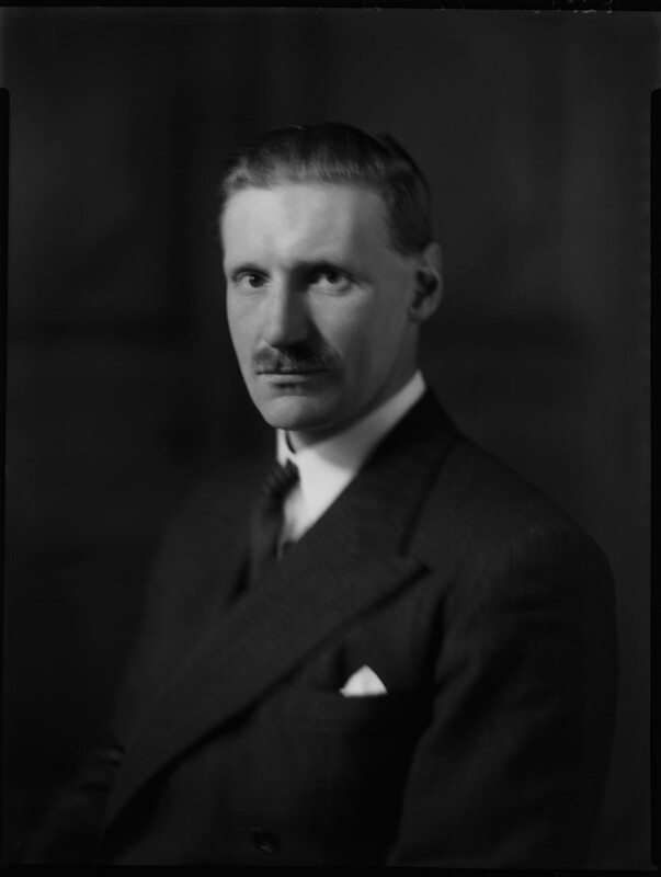 Lord Dundee